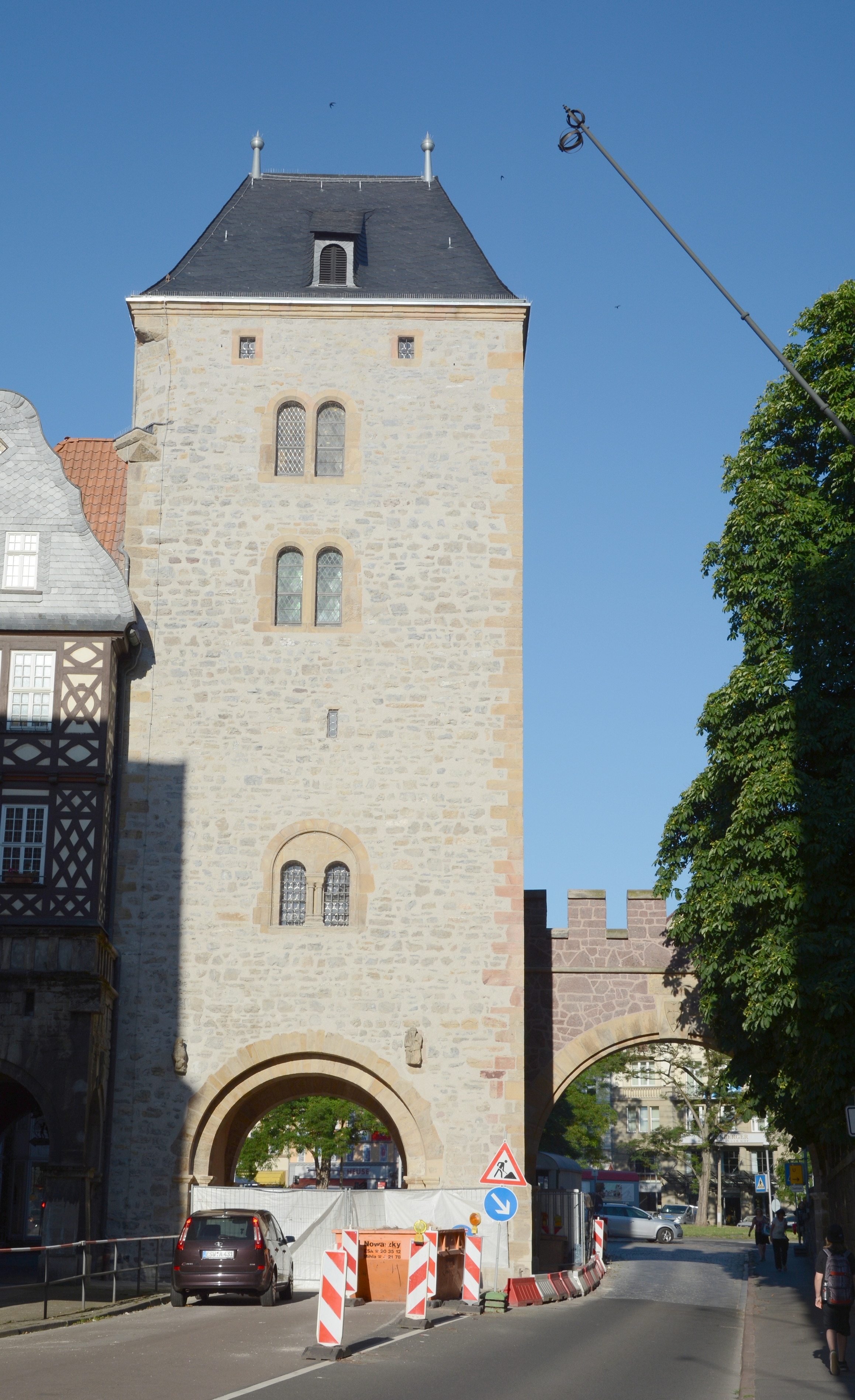 Ansicht des restaurierten Turmes